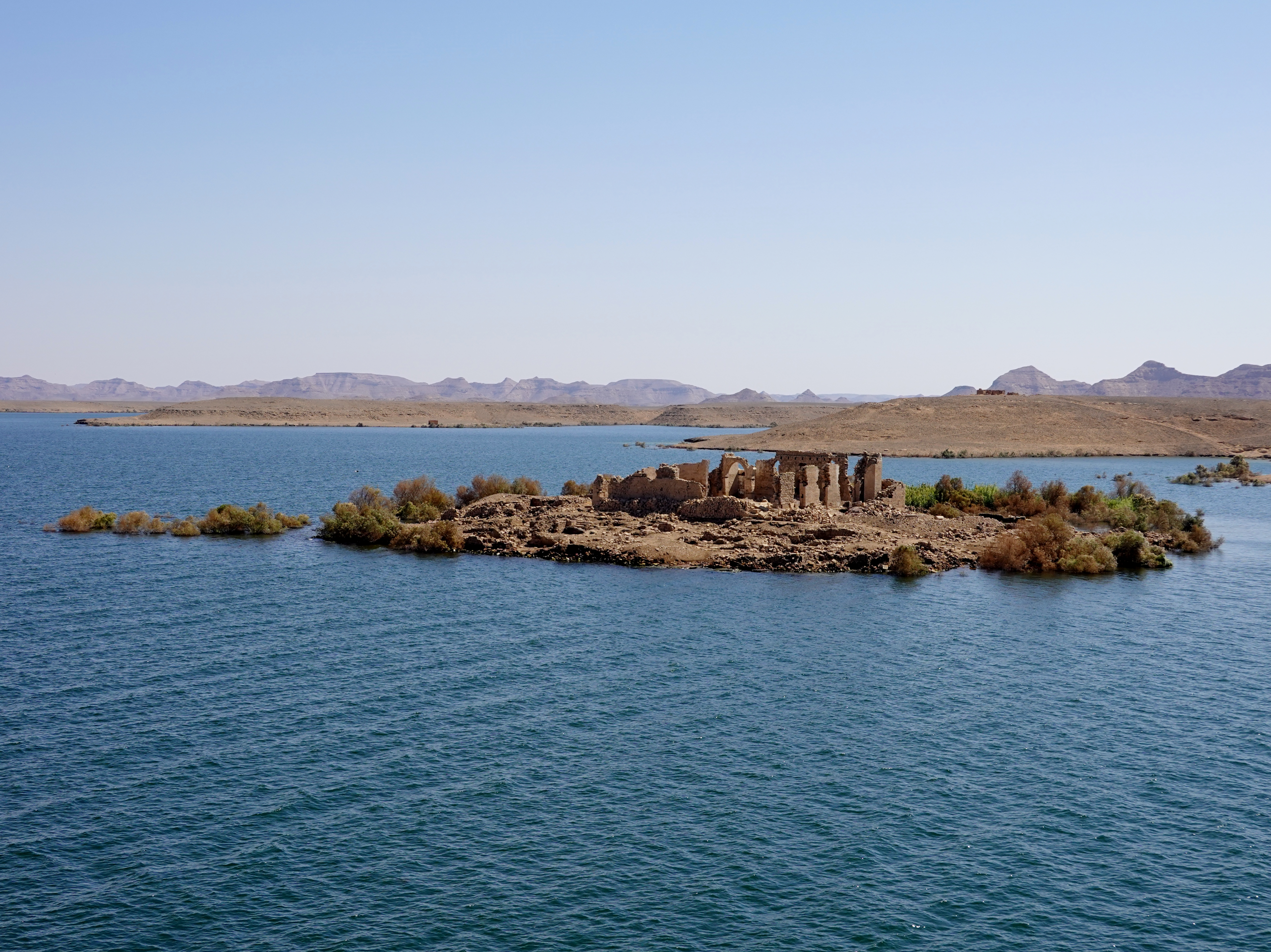 Bergspitze mit Ruinen von Qasr Ibrim im Nassersee, Ägypten